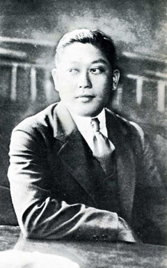 a Japanese man(Minakami Takitaro)